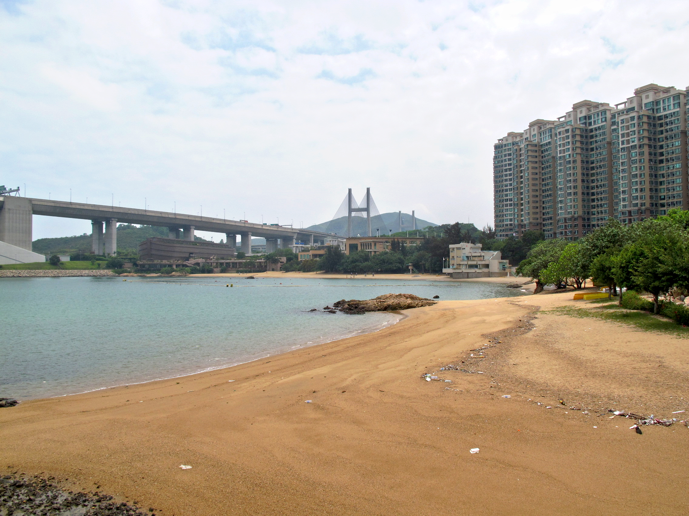 Tung Wan